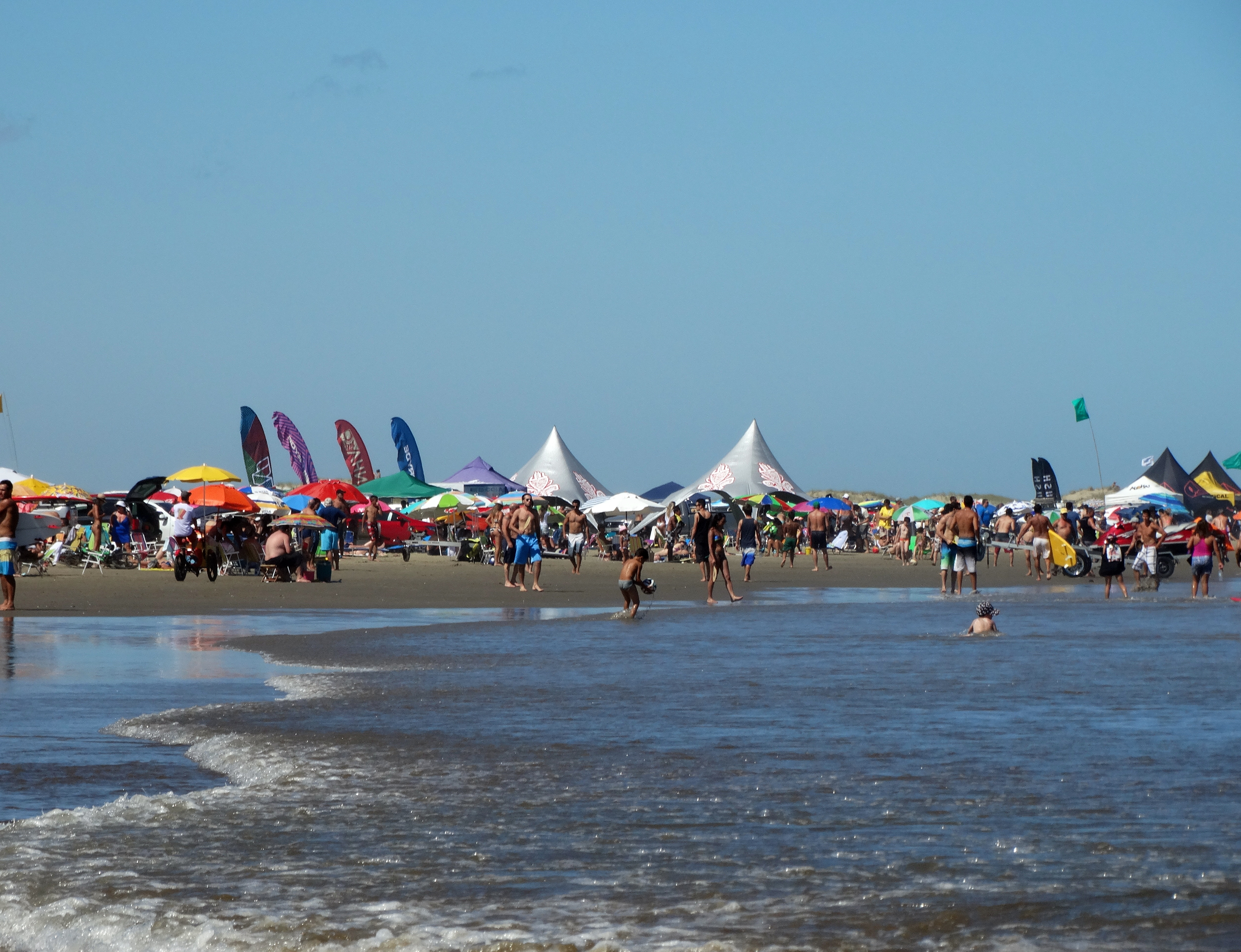 verão praia cheia